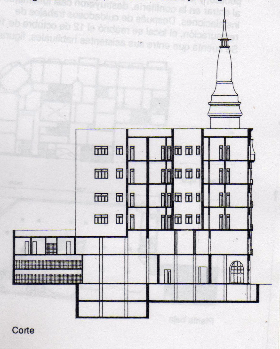 corte